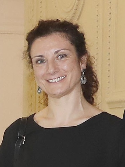 Nuria López, Mayte Gallego, Elena García Armada, Futsi Atlético Navalcarnero, Topacio Fresh, Ángeles Sánchez y Ana Isabel Pereda son mujeres extraordinarias y reciben los ‘Reconocimientos 8 de marzo’ por lo que hacen y lo que representan. ¡Enhorabuena a todas!